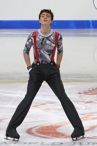 Маурицио Цандрон (Италия) на чемпионате мира по фигурному катанию среди юниоров 2012